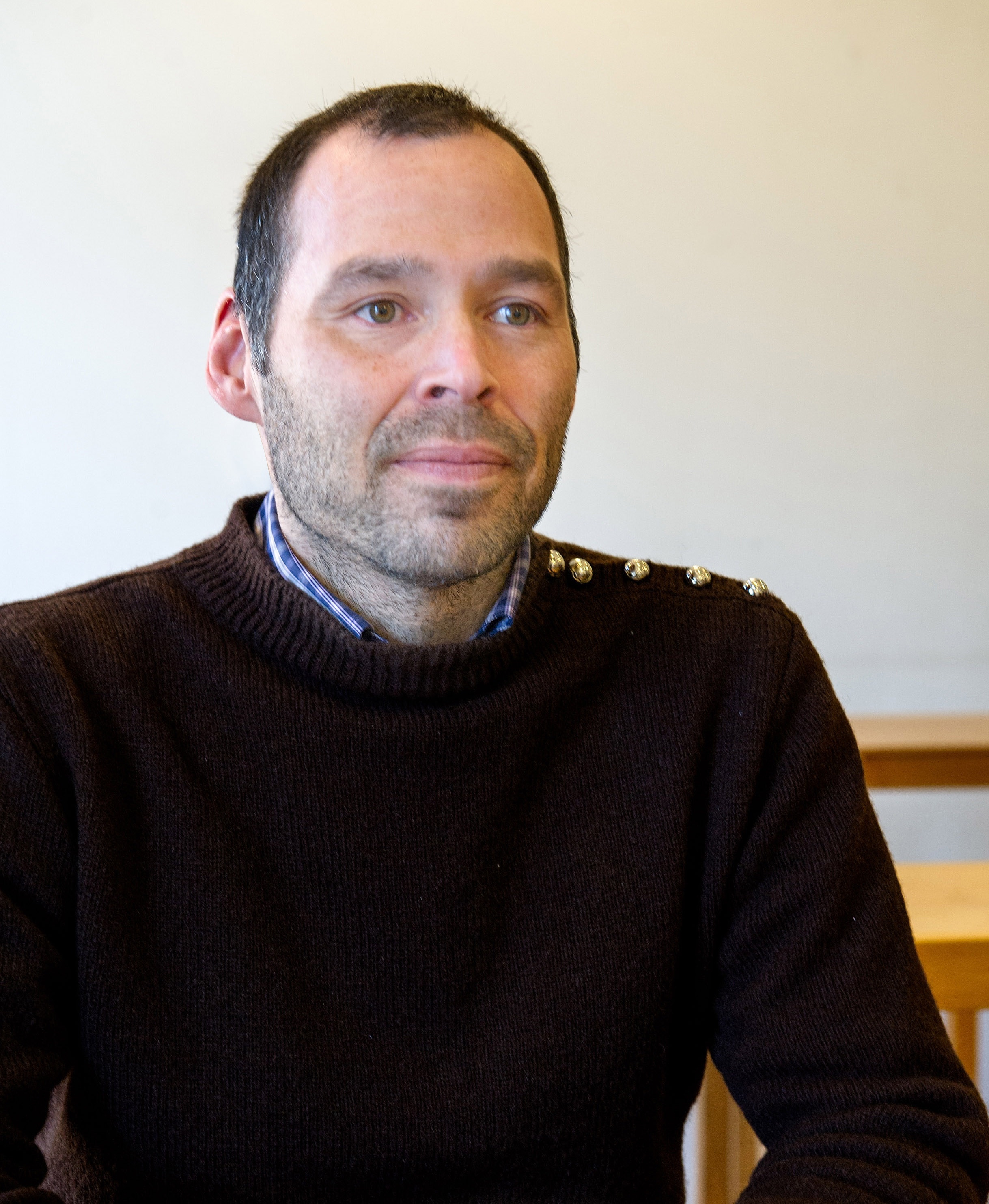 Nick Nielsen, Undervisningsminister Grønland i Regeringen Aleqa Hammond (2013-)